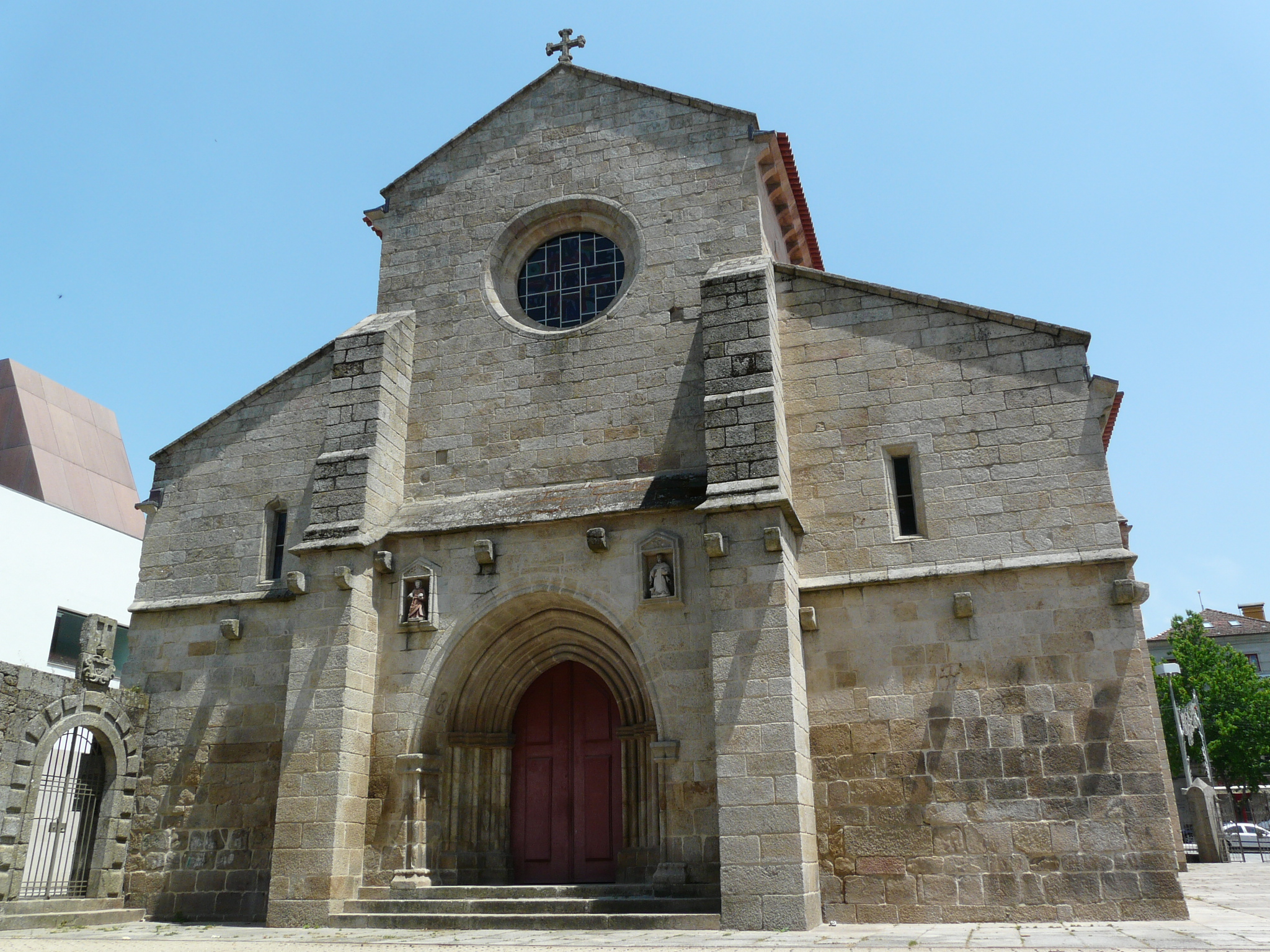 Vila Real Cathedral (Sé de Vila Real)